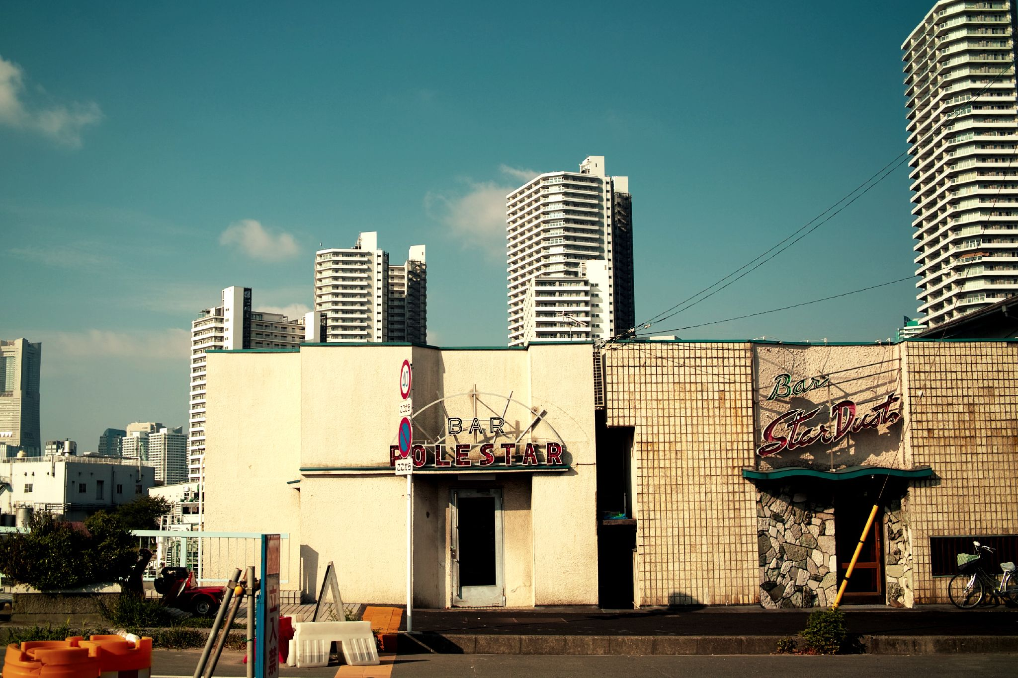 神奈川県横浜市 Bar StarDust＆Bar POLESTAR